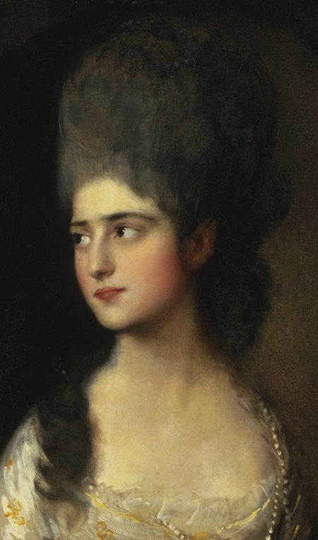 Портрет місс Елізабет Лінлі роботи британського портретиста Томаса Гейнсборо. Художник не одноразово малював Місс Лінлі, що виявилась жінкою з твердим характером і здатною захистити власне кохання.